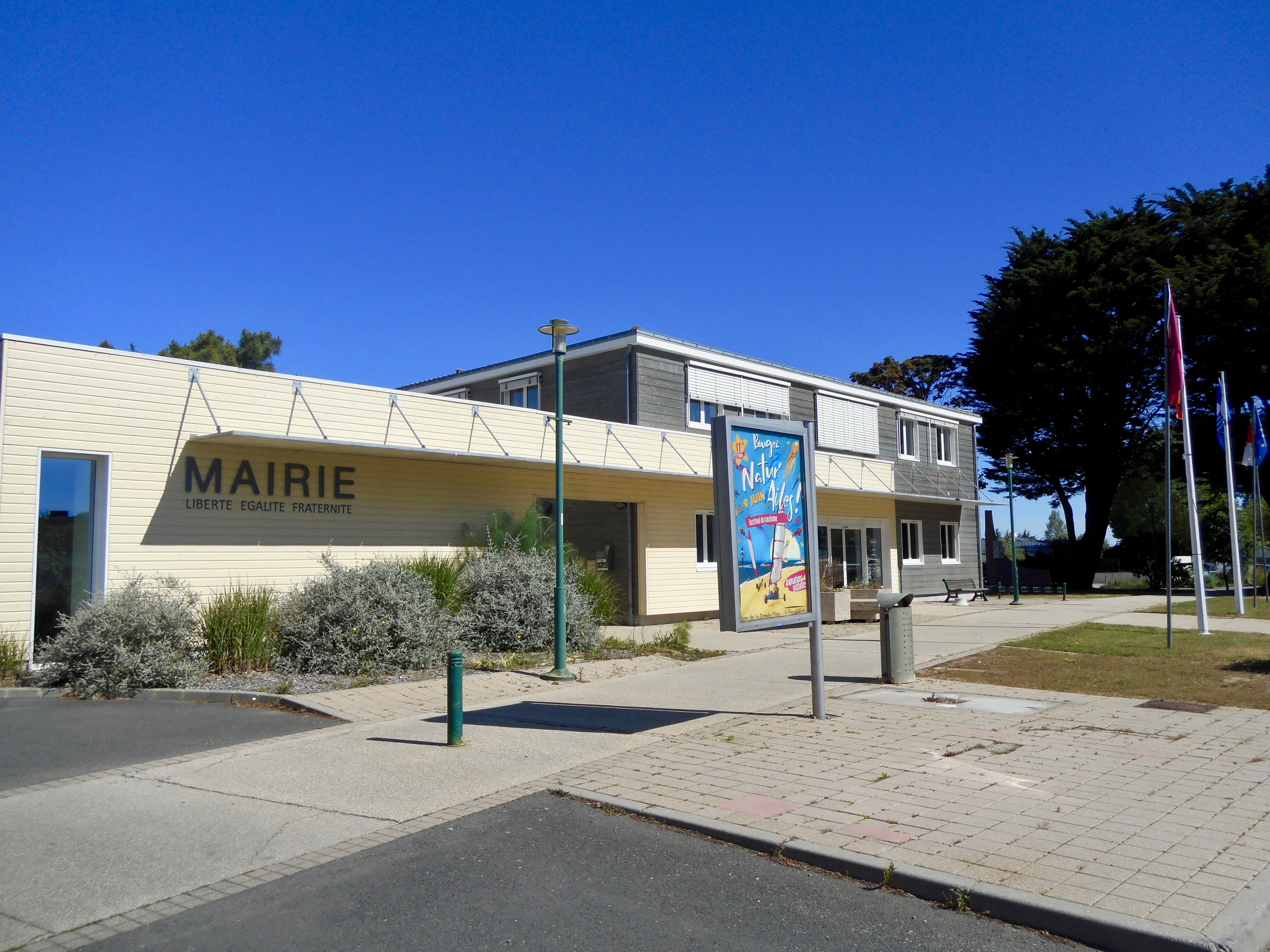 Mairie de La Barre-de-Monts (2019)